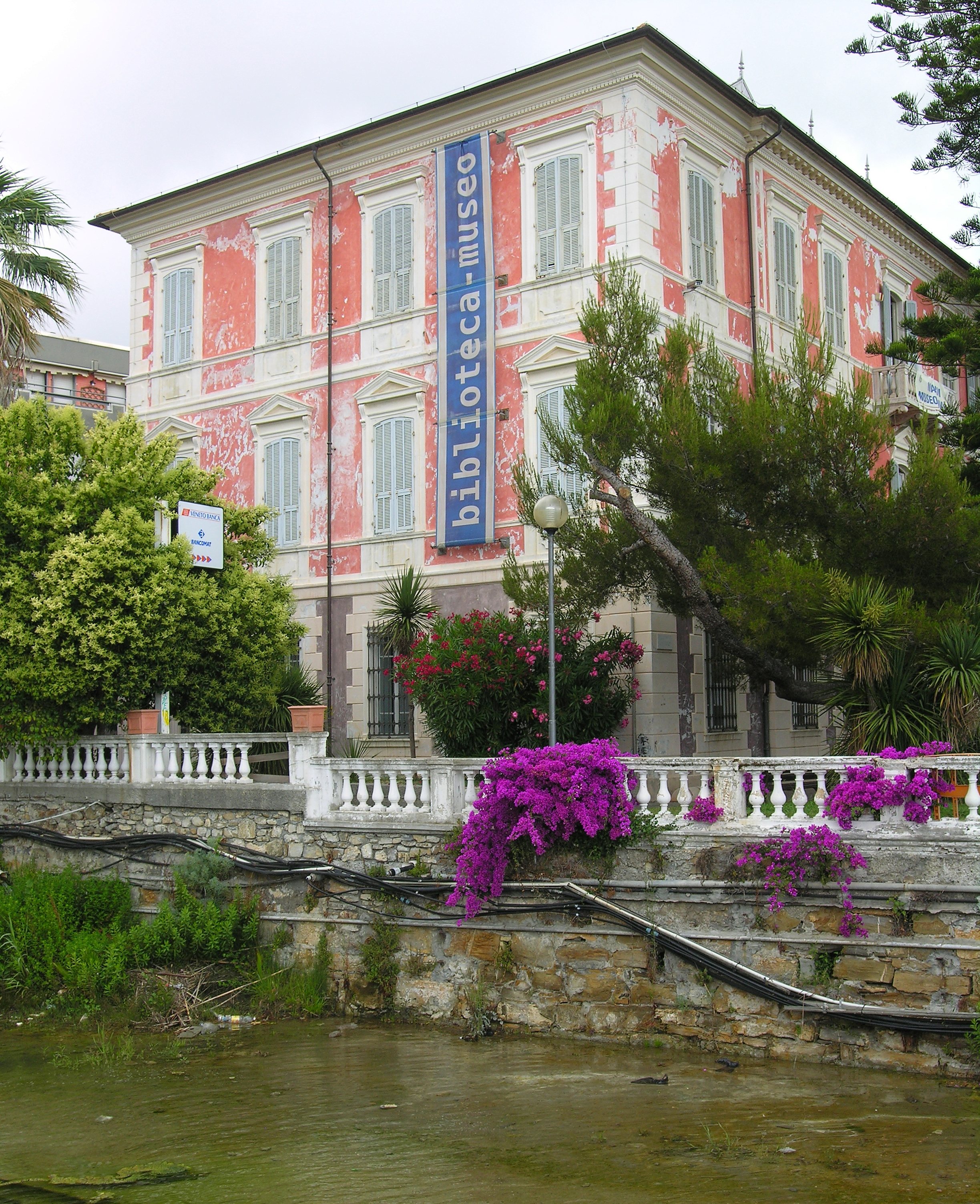 Diano Marina, Liguria